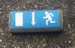 Ein blaues Fluchtweg-Zeichen am Bahnhof Köln Messe/Deutz